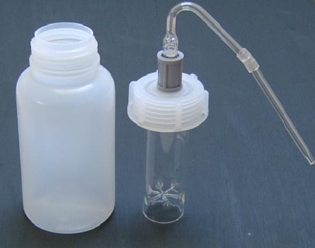 Gasentwicklungsflasche (Flasche und Einsatz getrennt)